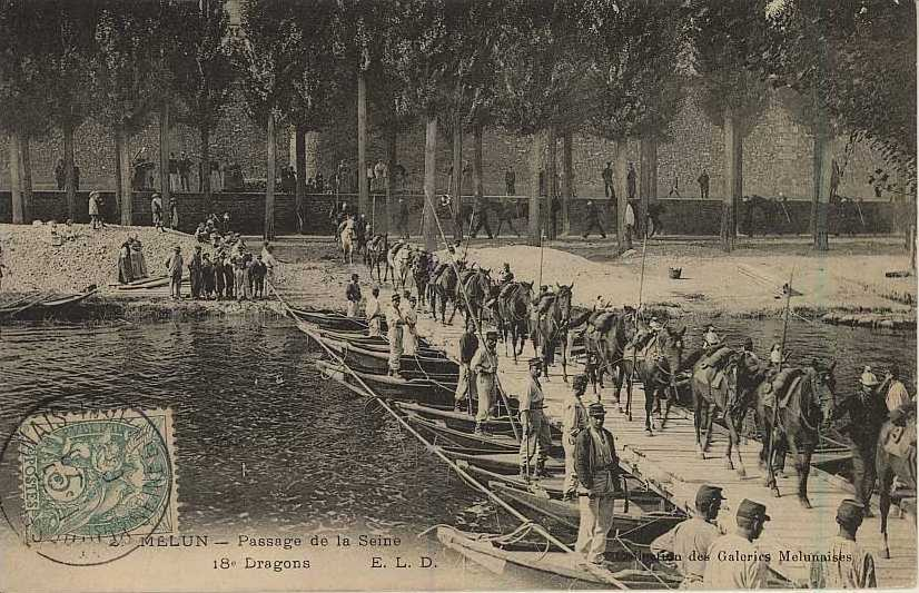 18eme Dragons passage de la Seine à Melun